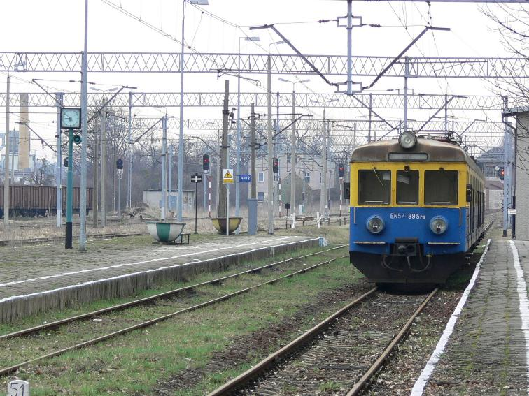 Fosowskie stacja PKP